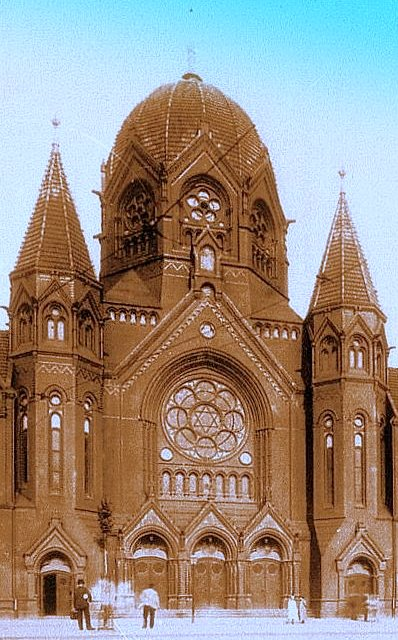 Калининградская Cинaгoга